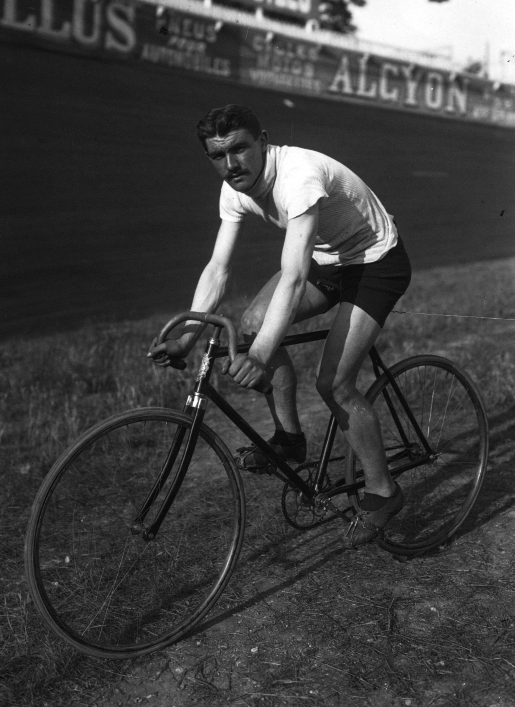 André Trousselier [portrait du coureur cycliste avant le départ]